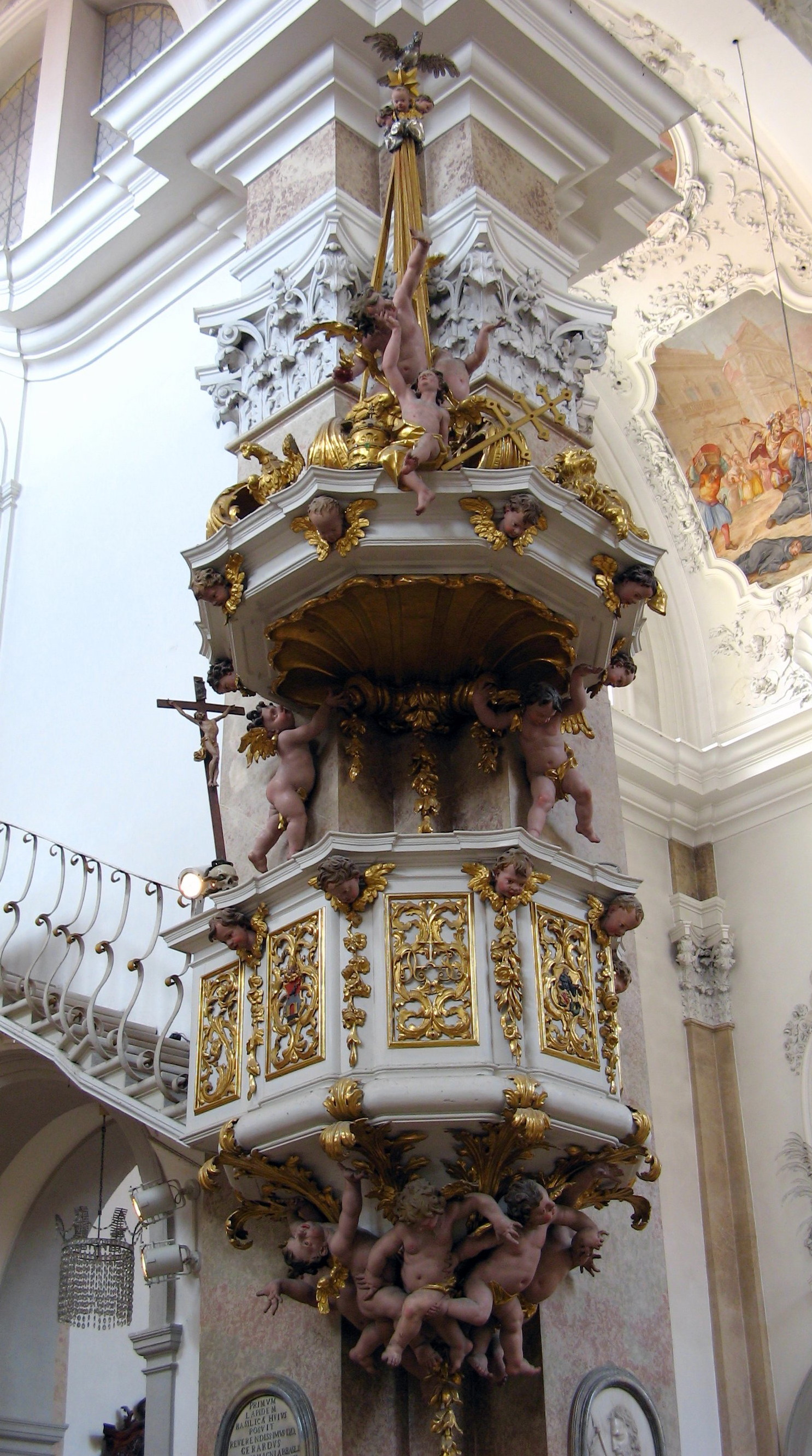 Vergoldung der Kanzel in der Kirche St. Mang in Füssen durch Bonaventura Stapf